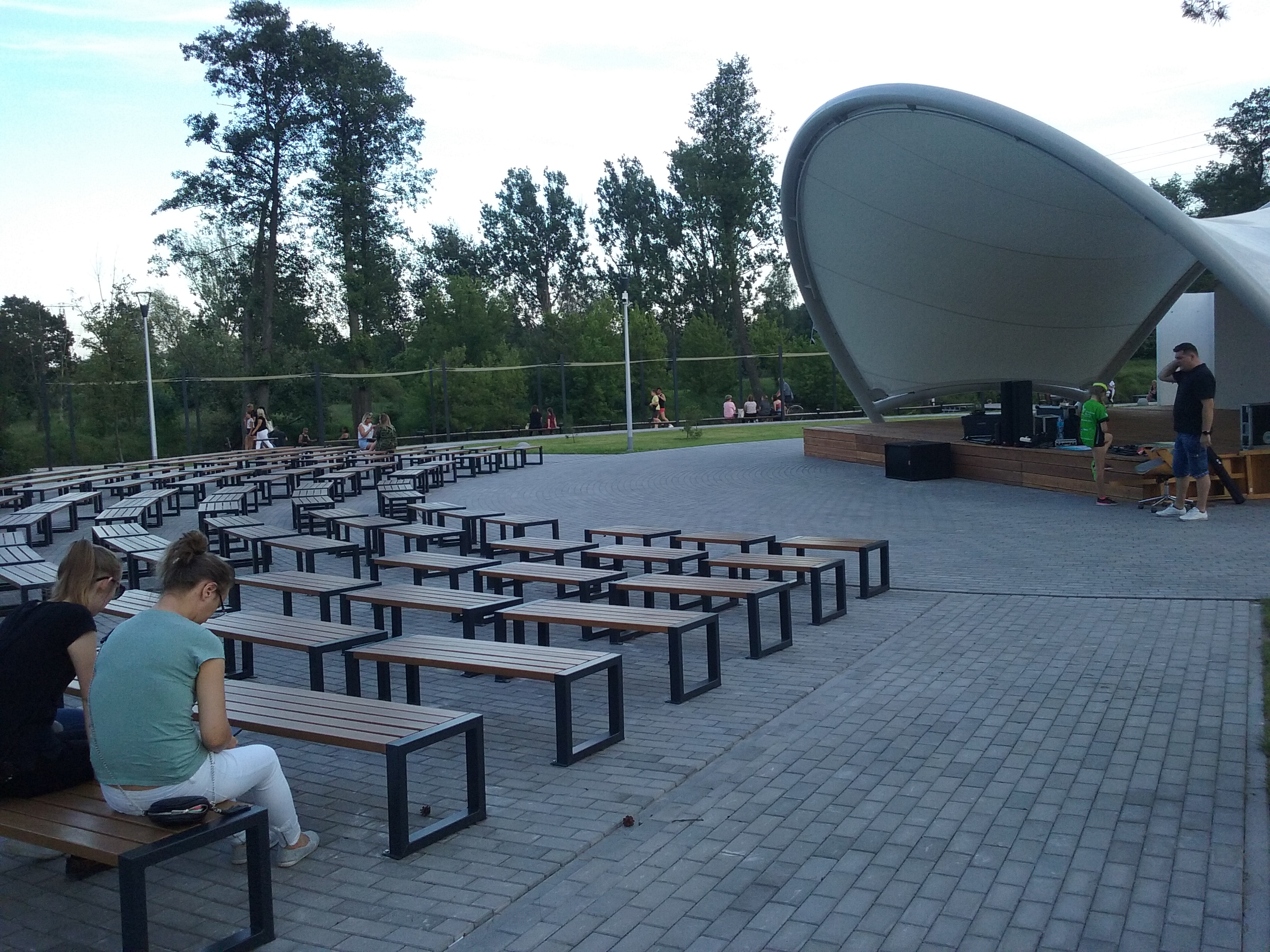 Przystań nad rzeką Pilicą w Tomaszowie Mazowieckim. Amfiteatr